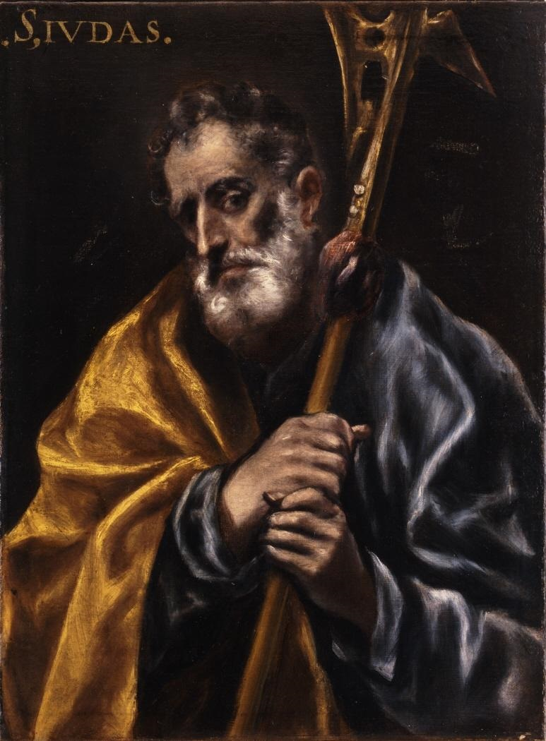 La obra representa a San Judas Tadeo, uno de los doce Apóstoles.